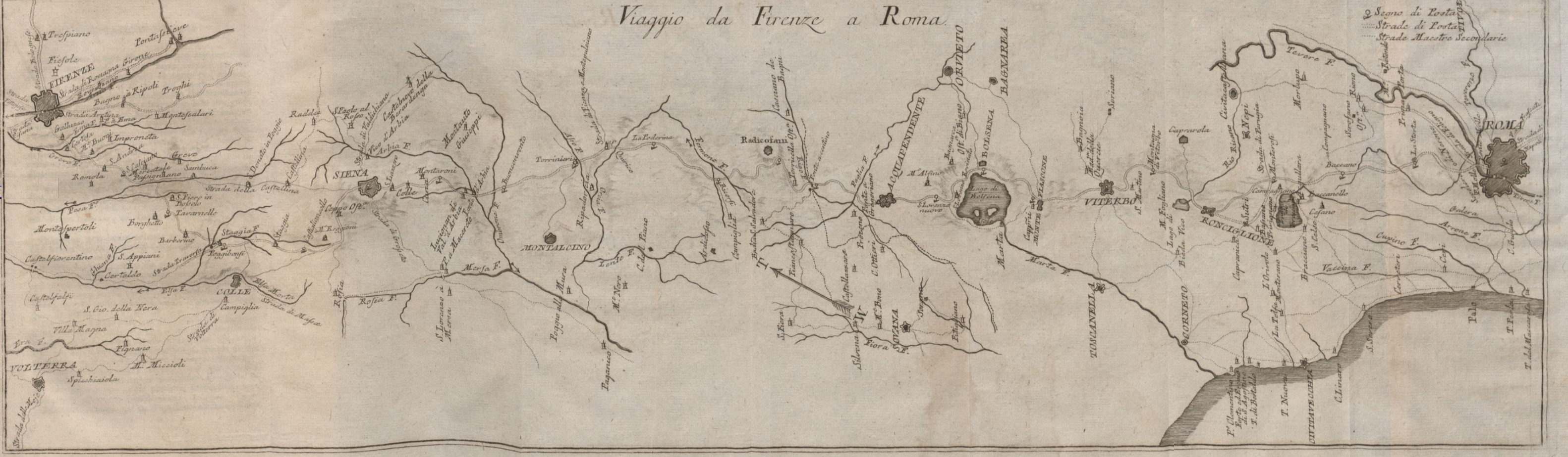 Plan du voyage de Florence à Rome (année1801)